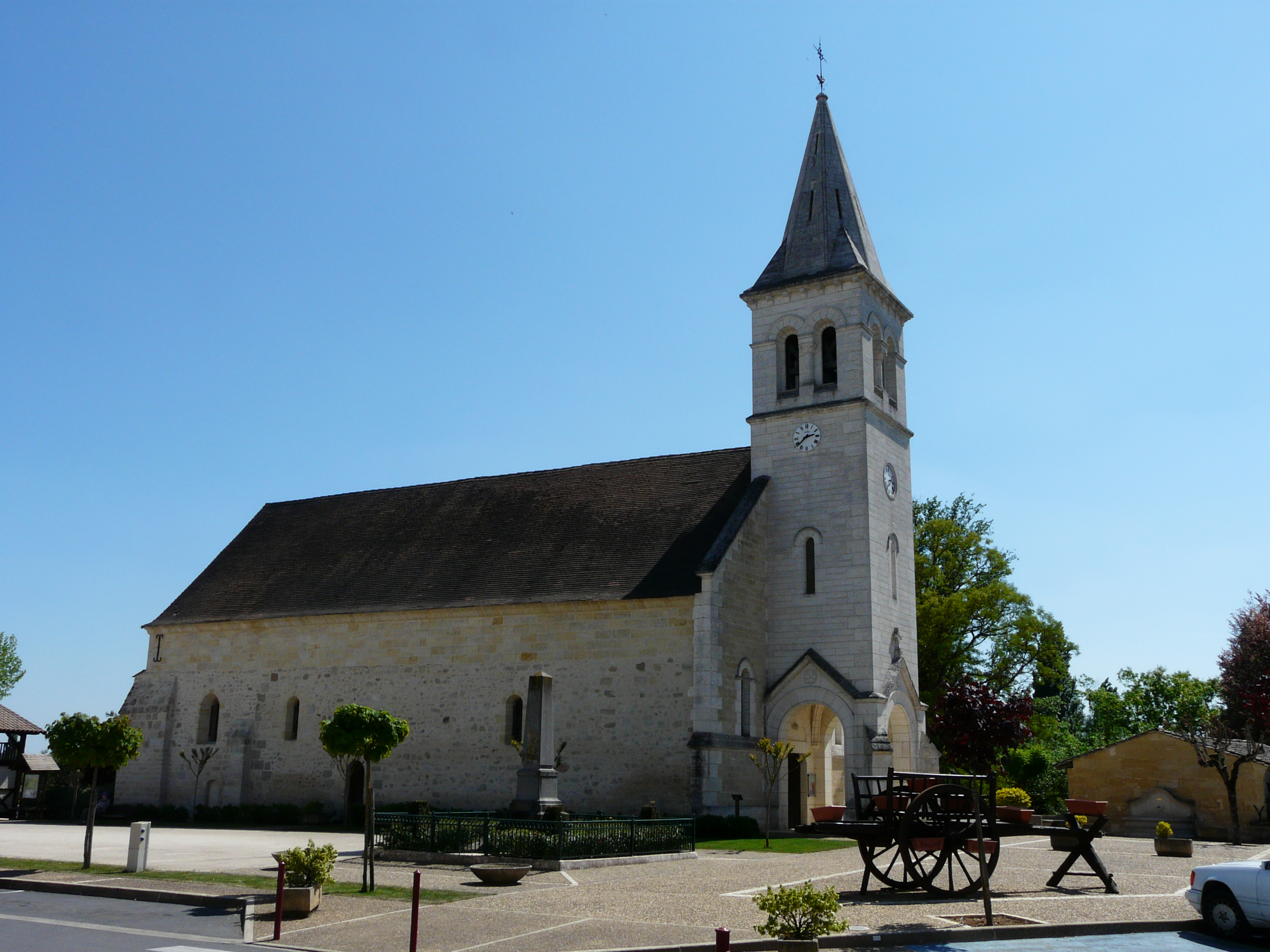 La façade nord de l'église Notre-Dame-de-l'Assomption, Le Pizou, Dordogne, France.